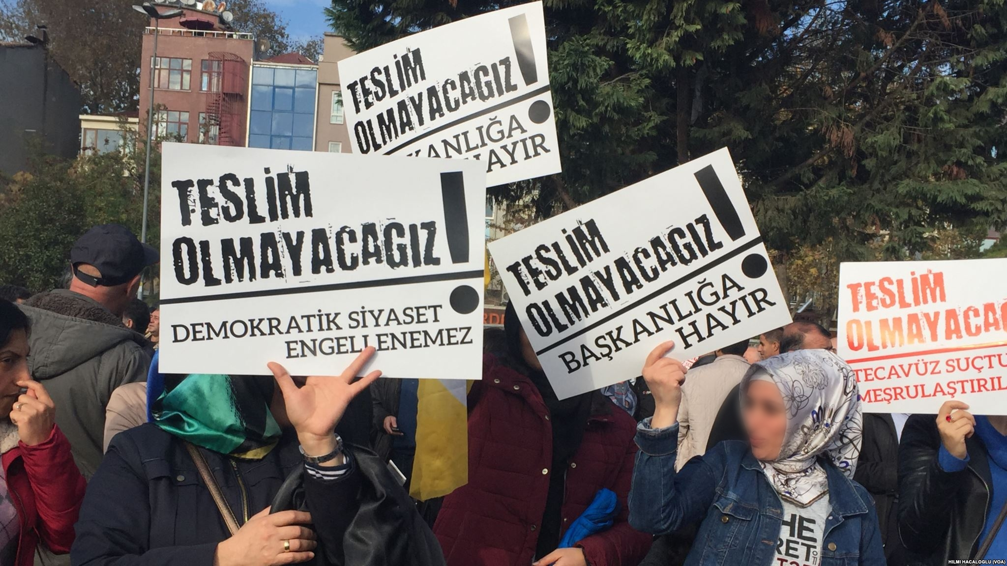 Birleşik Haziran Hareketi'nin Kartal, İstanbul'da düzenlediği "Saltanata Teslim Olmayacağız" mitinginde açılan "Başkanlığa Hayır" ve "Demokratik Siyaset Engellenemez" dövizleri.